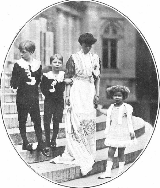 Fotografía de la reina Isabel de Bélgica con sus hijos Leopoldo, Carlos y María publicada en 1914 con motivo de haber sido Bélgica invadida por Alemania